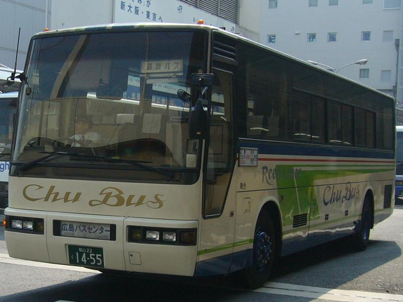 登録番号 福山22く14-55 中国バス所属 リードライナー号用 2006年6月5日 広島バスセンターにて撮影